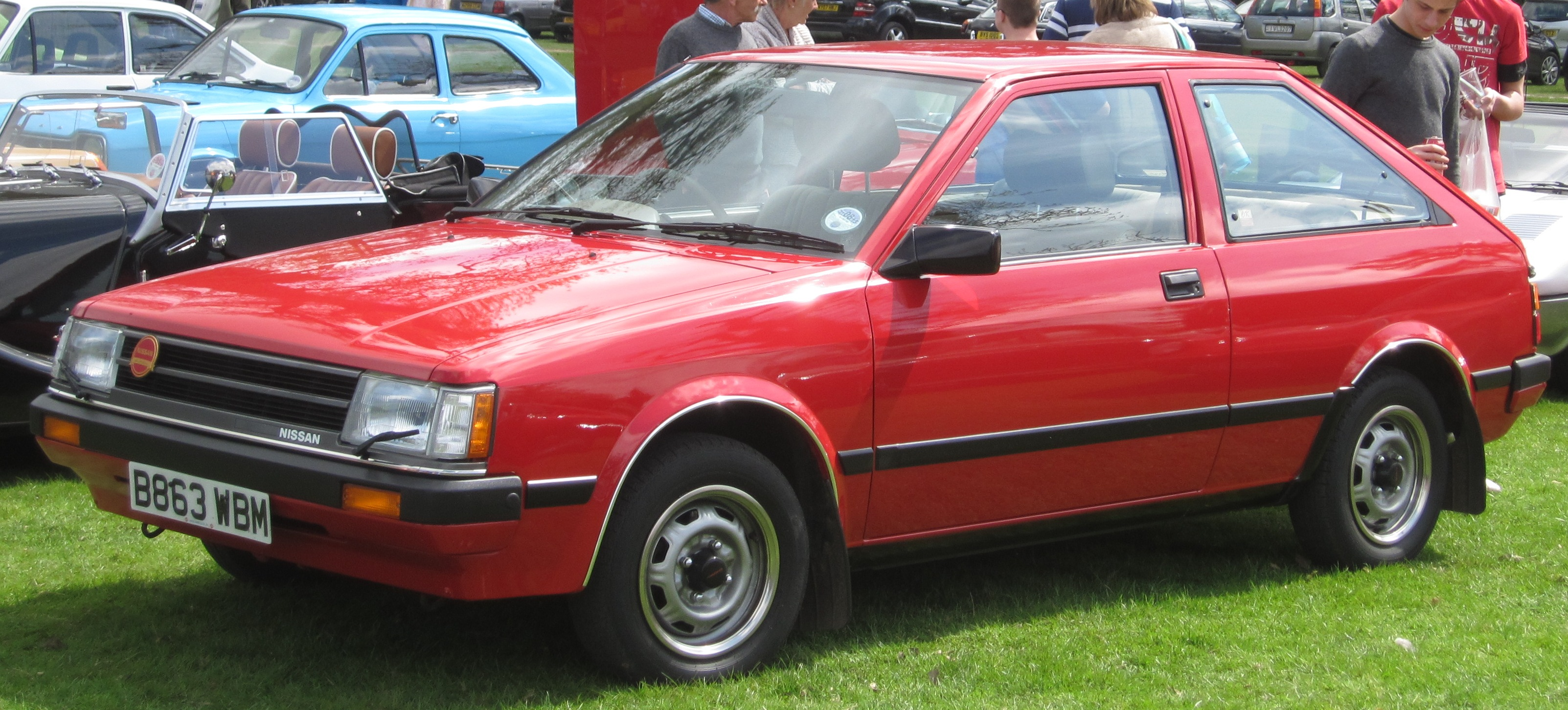 Nissan Cherry (selon le nom en Europe y comprennent RU)